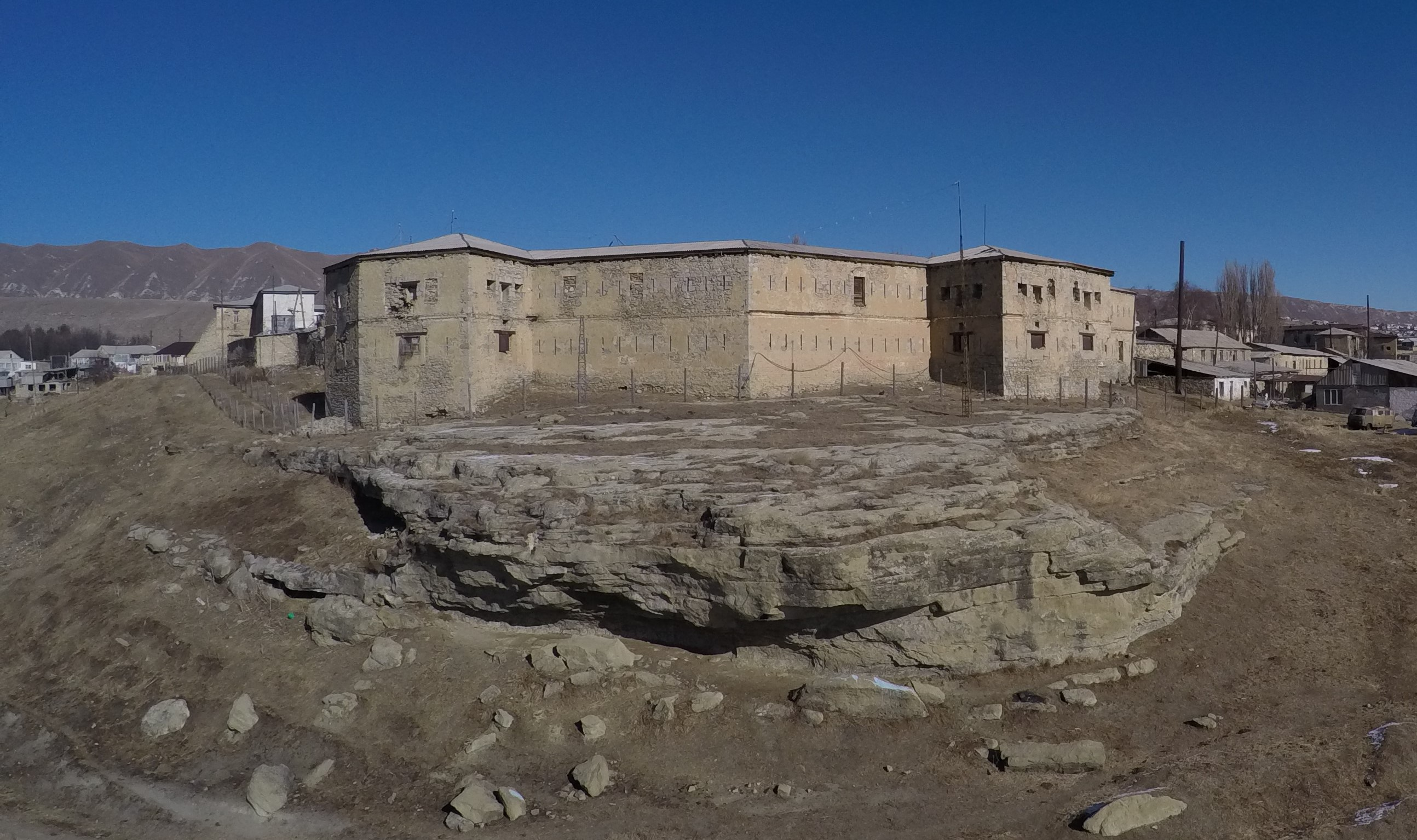 Аранинская крепость (западня часть)